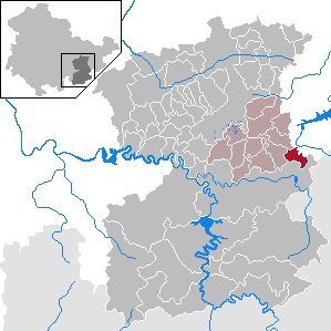 Kirschkau in Thuringia - Saale-Orla-Kreis